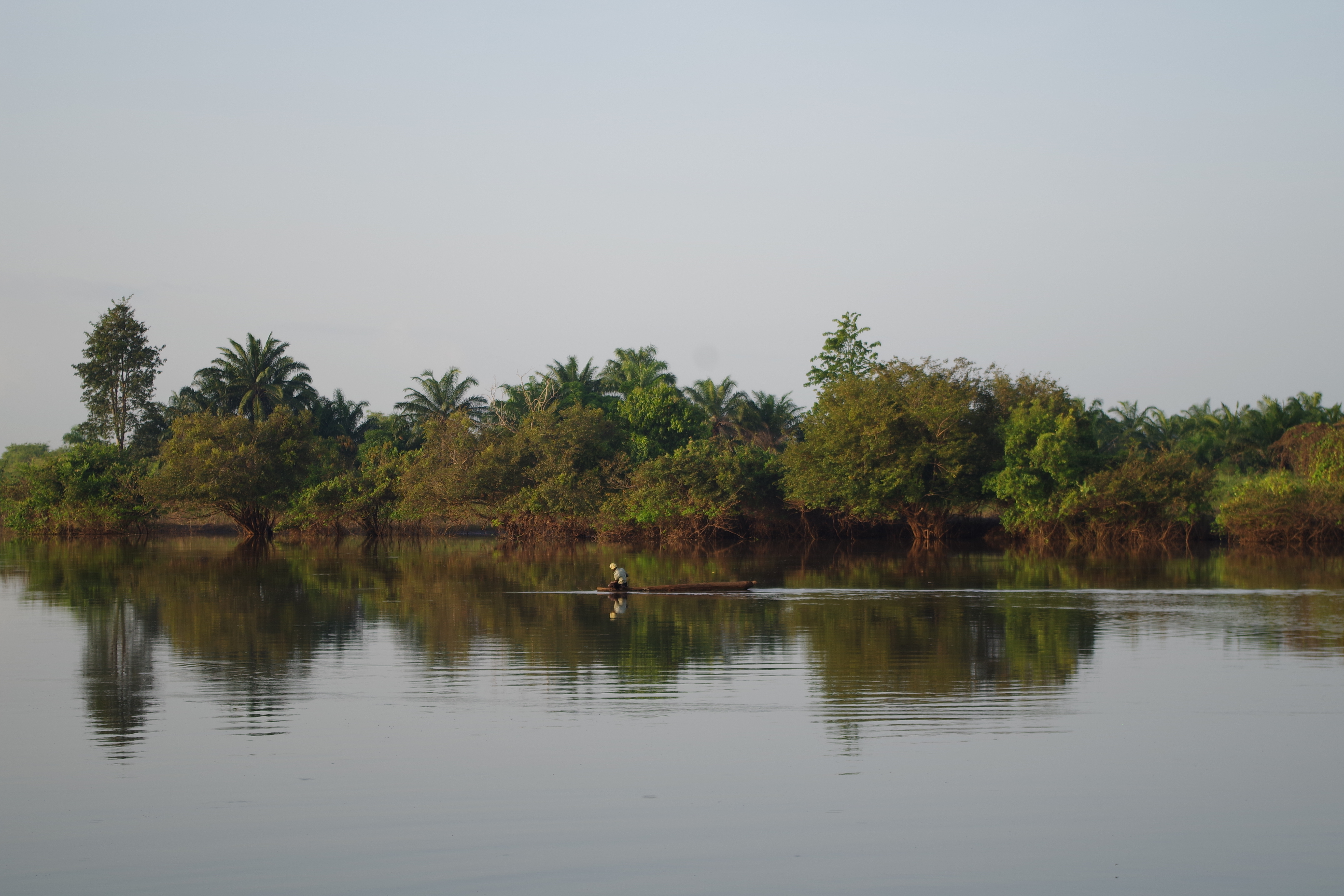 Les eaux du Fleuve Okpara au Bénin